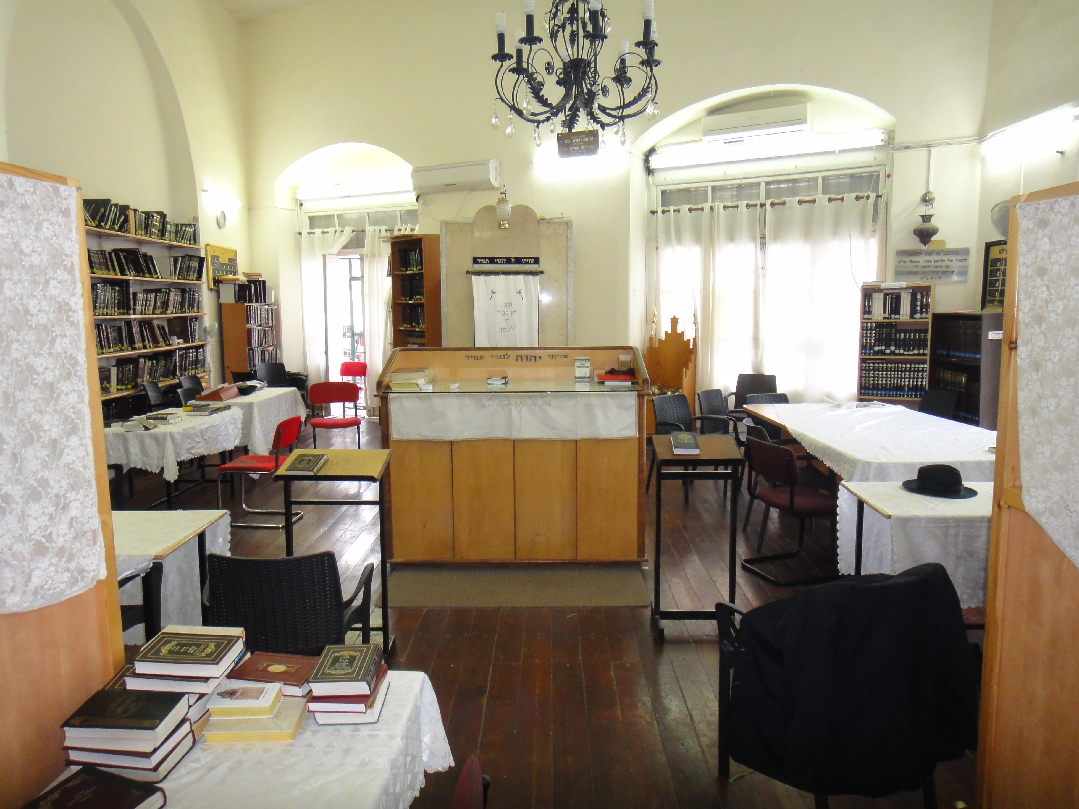 נאות דוד